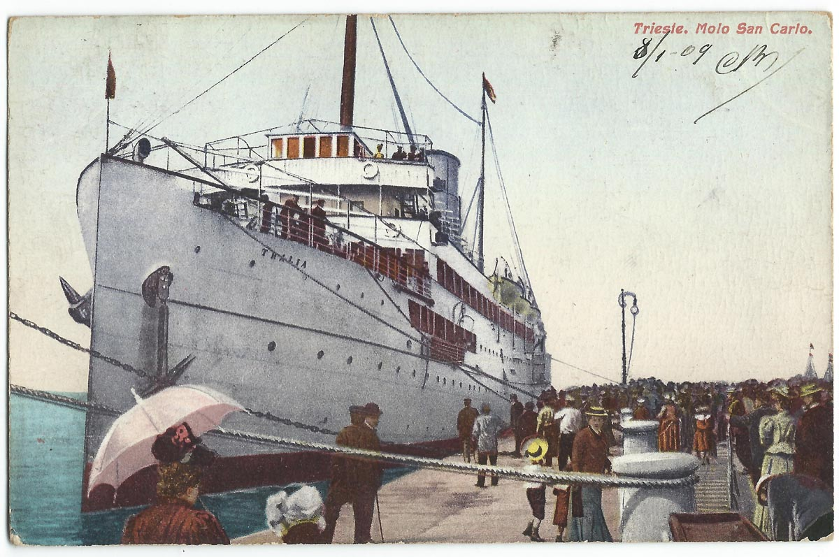 Vue de Trieste au début du XXe siècle.